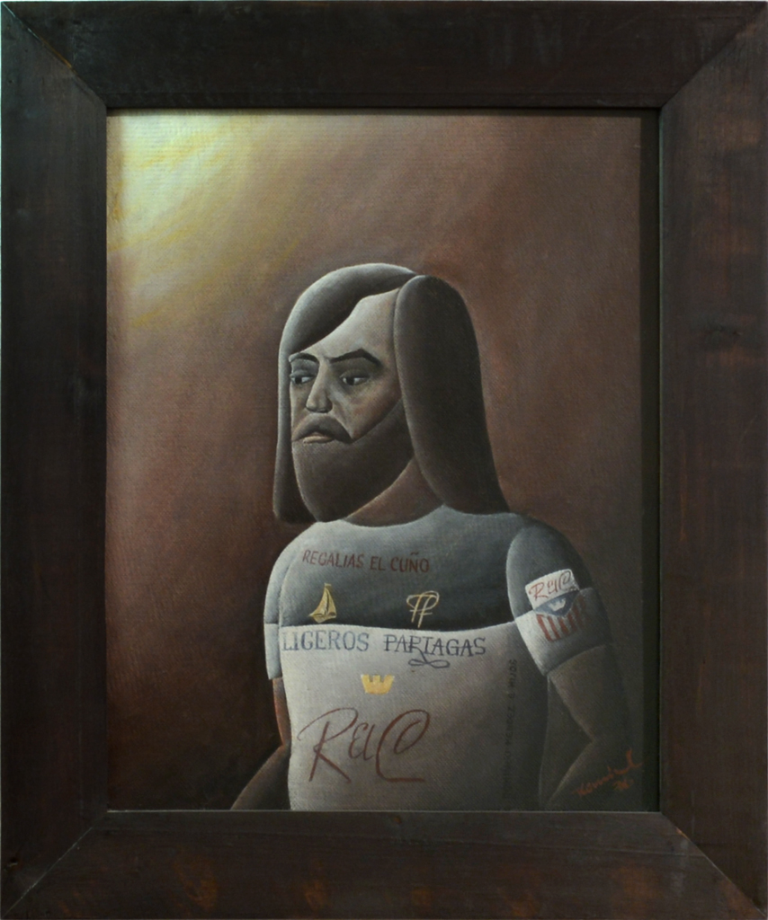 08. Bohumír Komínek, Autoportrét, latex a tempera (1976)